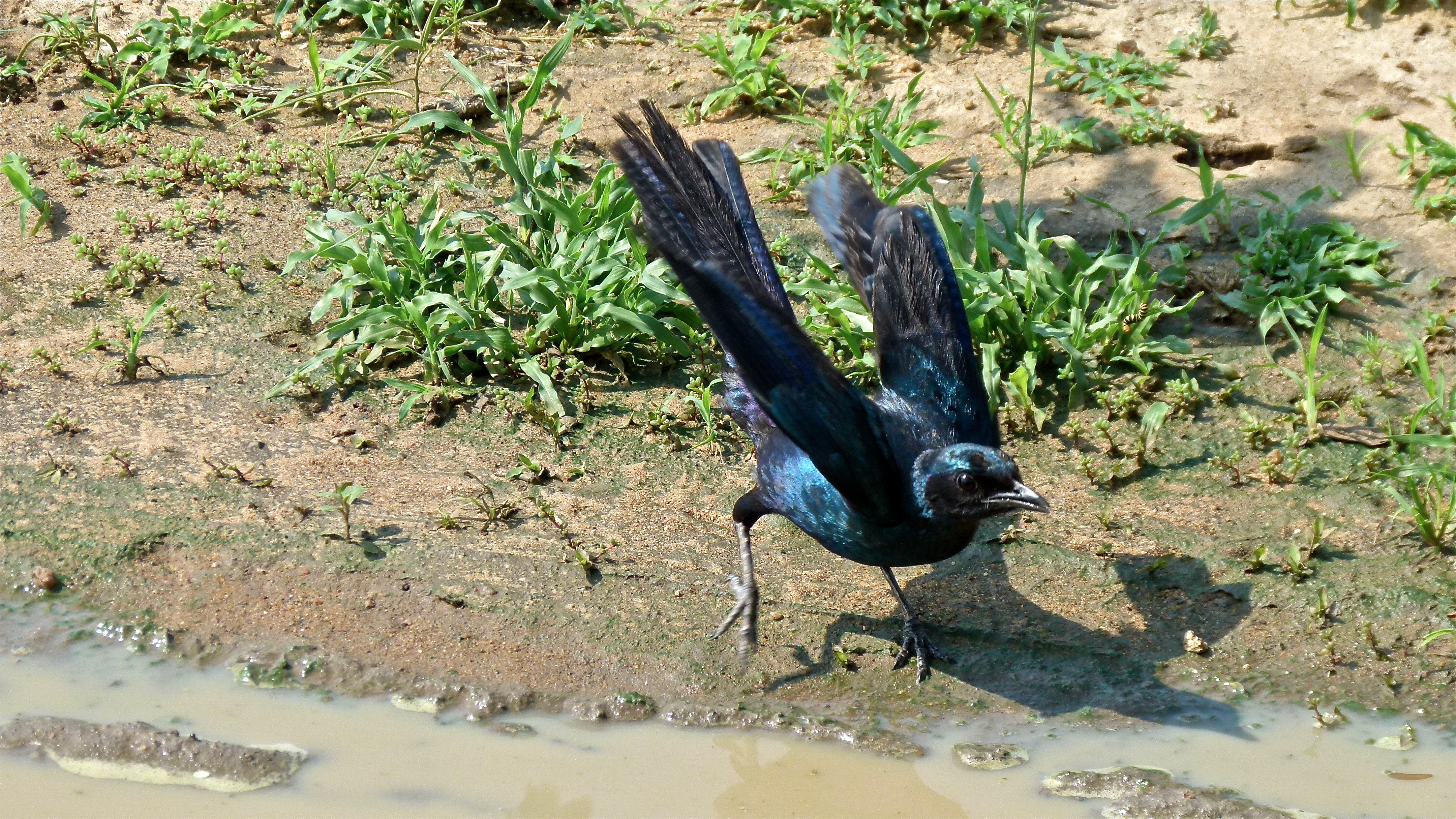 H1-2 Leeupan, Kruger NP, SOUTH AFRICA